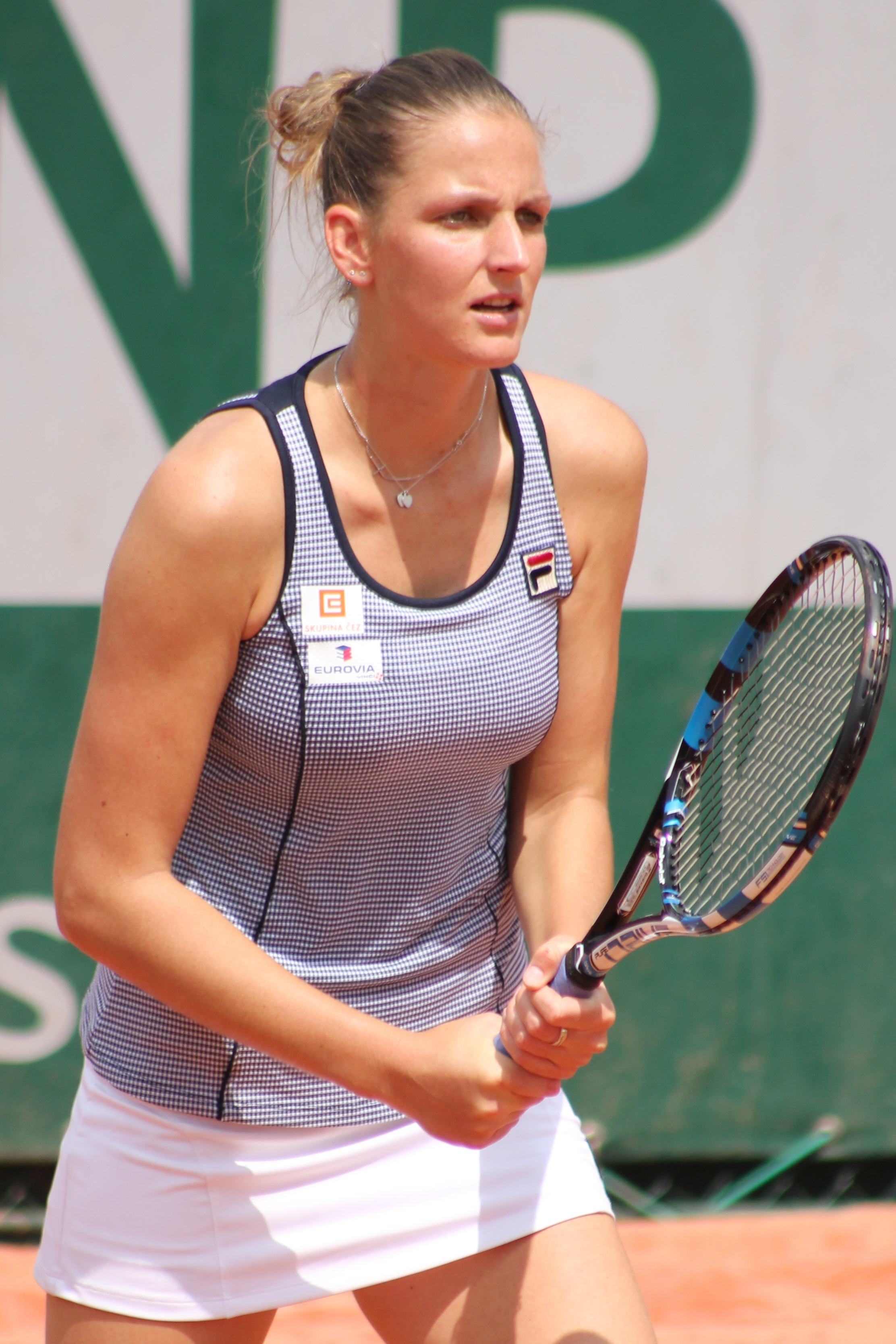 Pliskova Ka. RG16 (1)